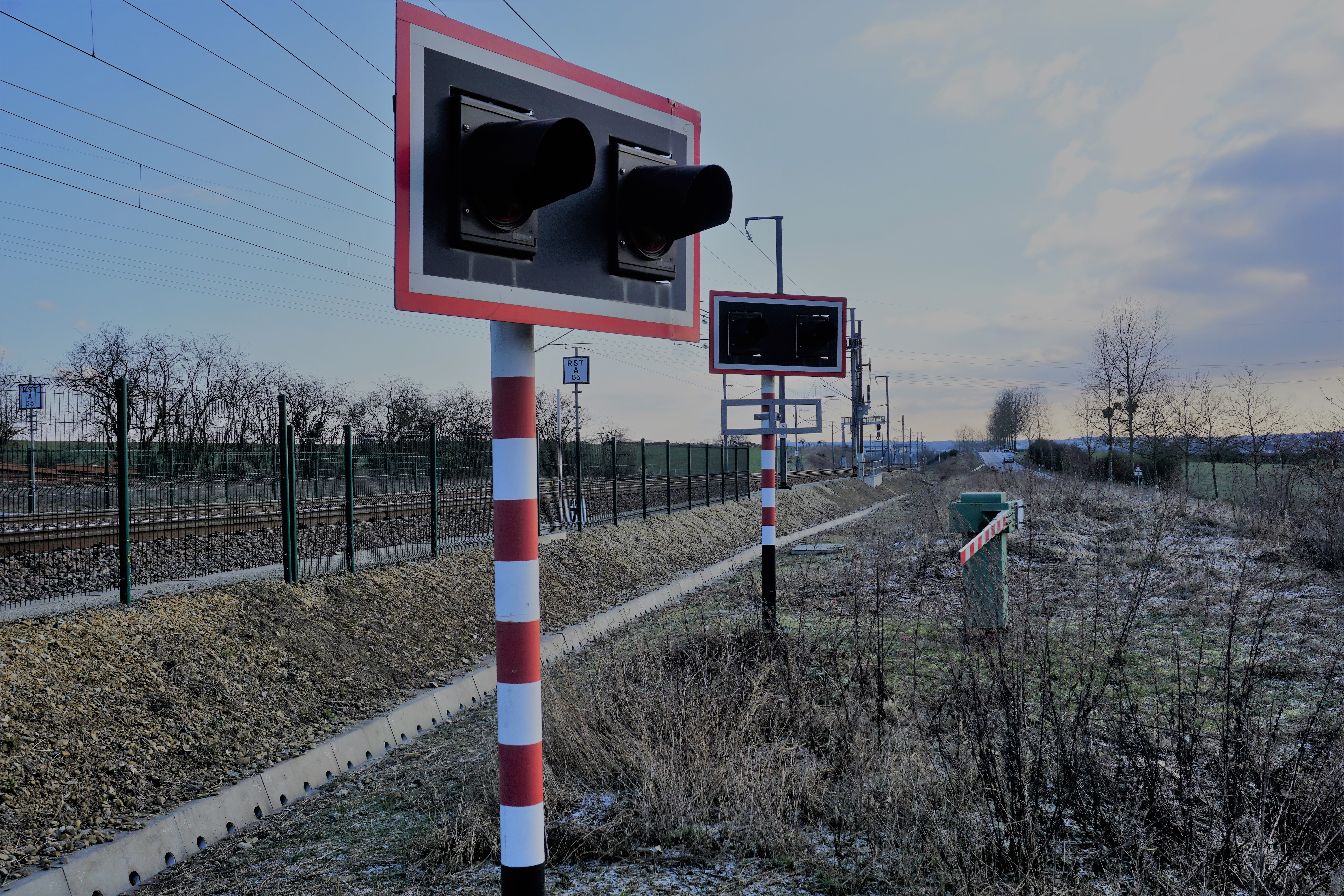 Leudelange, Schléiwenhaff. Passage à niveau (PN7) désaffecté.